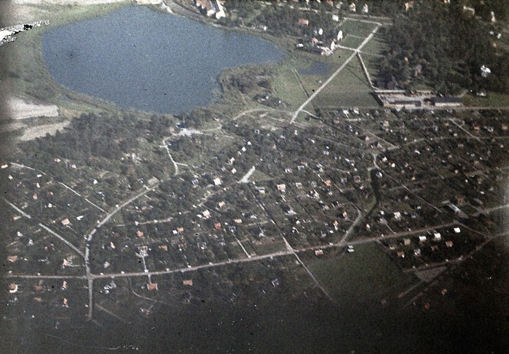 Flygbild västerifrån över Lillsjönäs koloniområde och Lillsjön i Ulvsunda